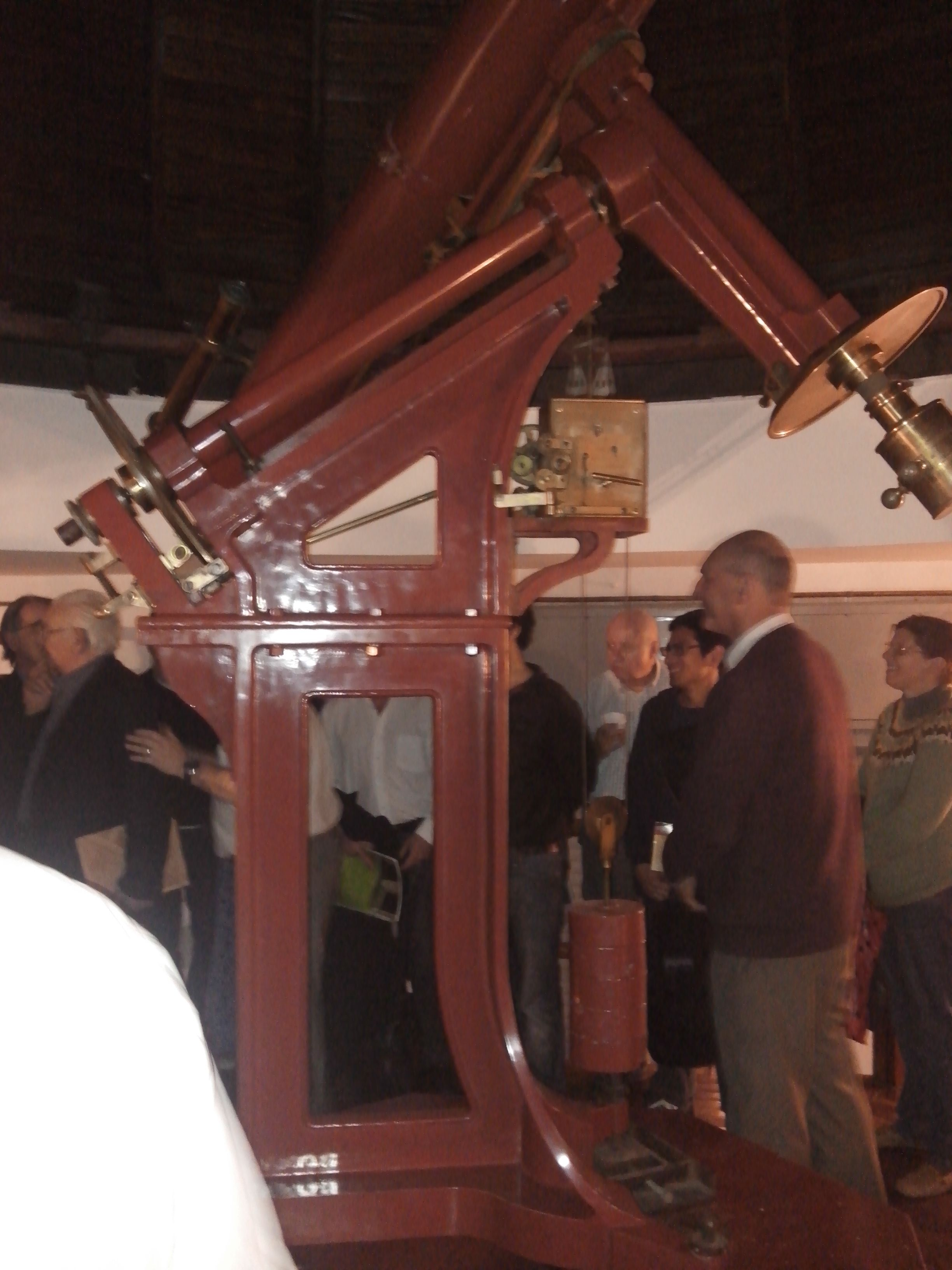 Sistema de Relojeria del Telescopio Gautier. Asociación Argentina Amigos de la Astronomía